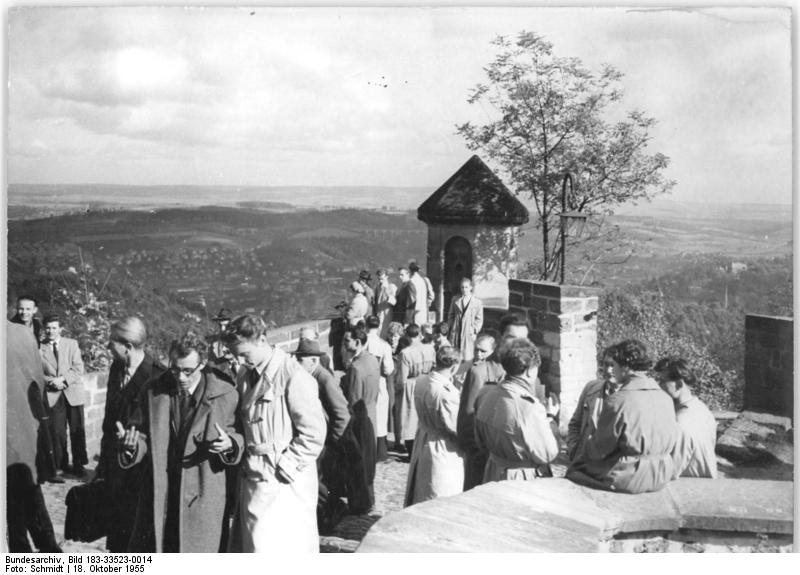 Eisenach, Wartburg, Burghof Zentralbild Bez.Red.Erfurt-Schmidt-Wehse-18.10.1955 Bn-Wjt-Ku. 1574.A.-V. -3232- Wartburgfest der deutschen Studenten 1955 in Eisenach (II.) Zum traditionellen Wartburgfest der deutschen Studenten in Eisenach sind in diesem Jahr zahlreiche Gäste von fast allen Universitäten Deutschlands erschienen. Sie folgten dem Ruf der Friedrich-Schiller-Universität, Jena. 500 (fünf null null) Professoren, Dozenten und Studenten nahmen an den Feierlichkeiten teil. Eine besondere Bedeutung erlangte das Wartburgfest durch die Anwesenheit sowjetischer Gastprofessoren und Studenten verschienenen Nationen. UBz: Freundschaftliche Gespräche hoch über dem Thüringer Land auf dem Wartburghof.